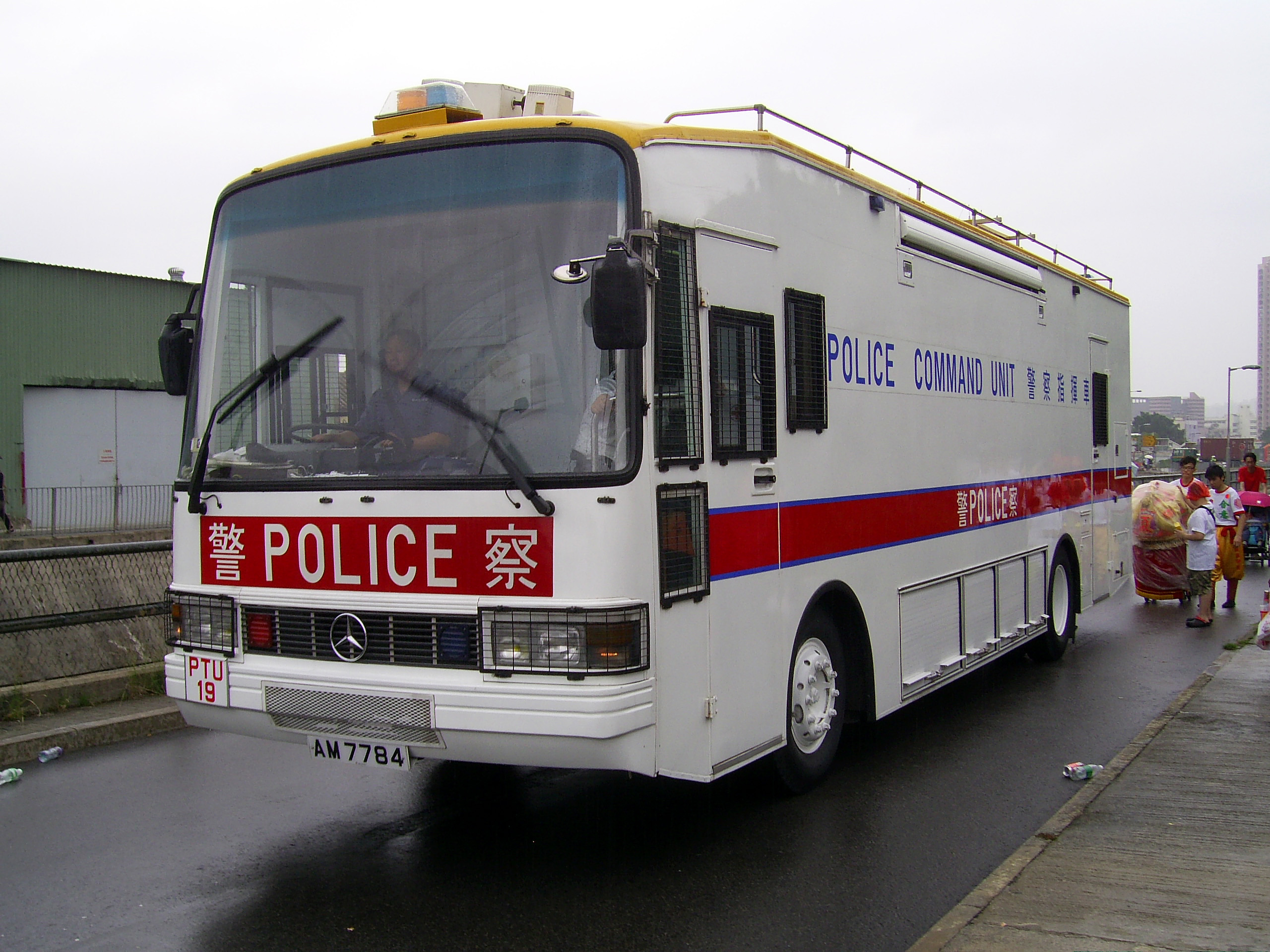 中文（香港）: 警察指揮車